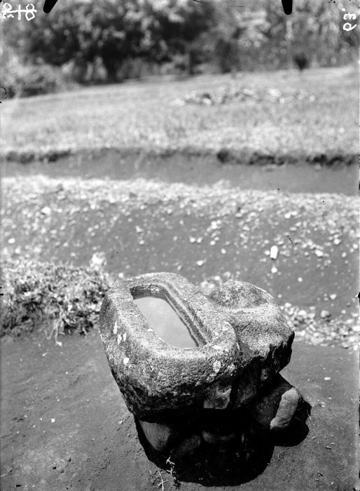 Negatief. Megalitische trog te Tebatgoenoeng